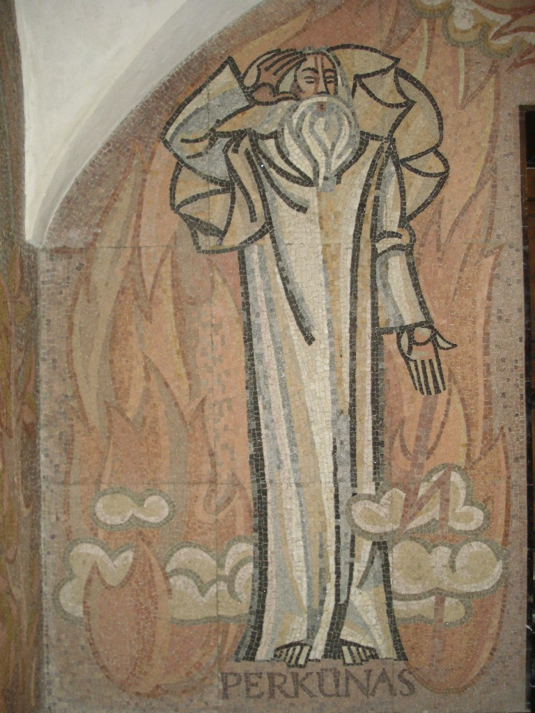 Бог грози